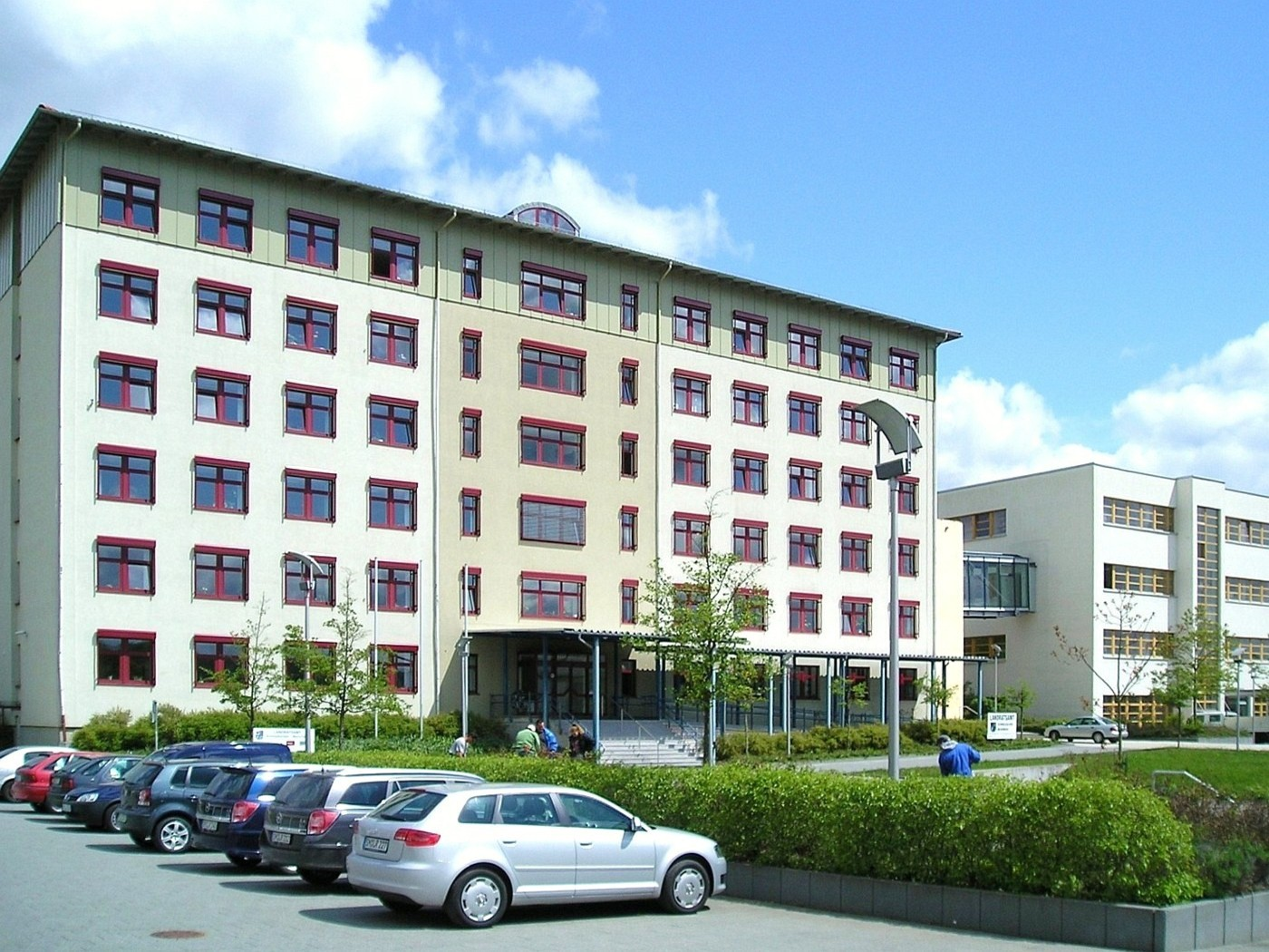 Das ehemalige Verwaltungsgebäude des Robotron Meiningen - heute Landratsamt Meiningen.